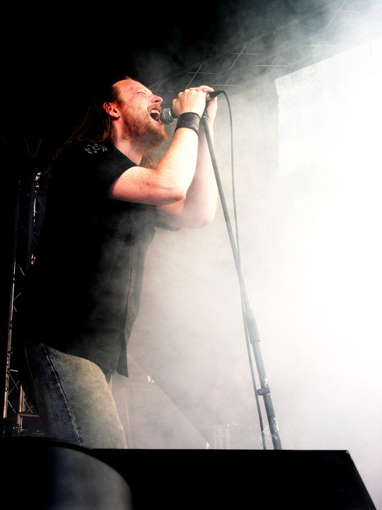 Mart Kalvet ansamblist Taak muusikafestivalil Rock Ramp 2011